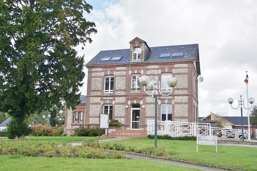 la Mairie